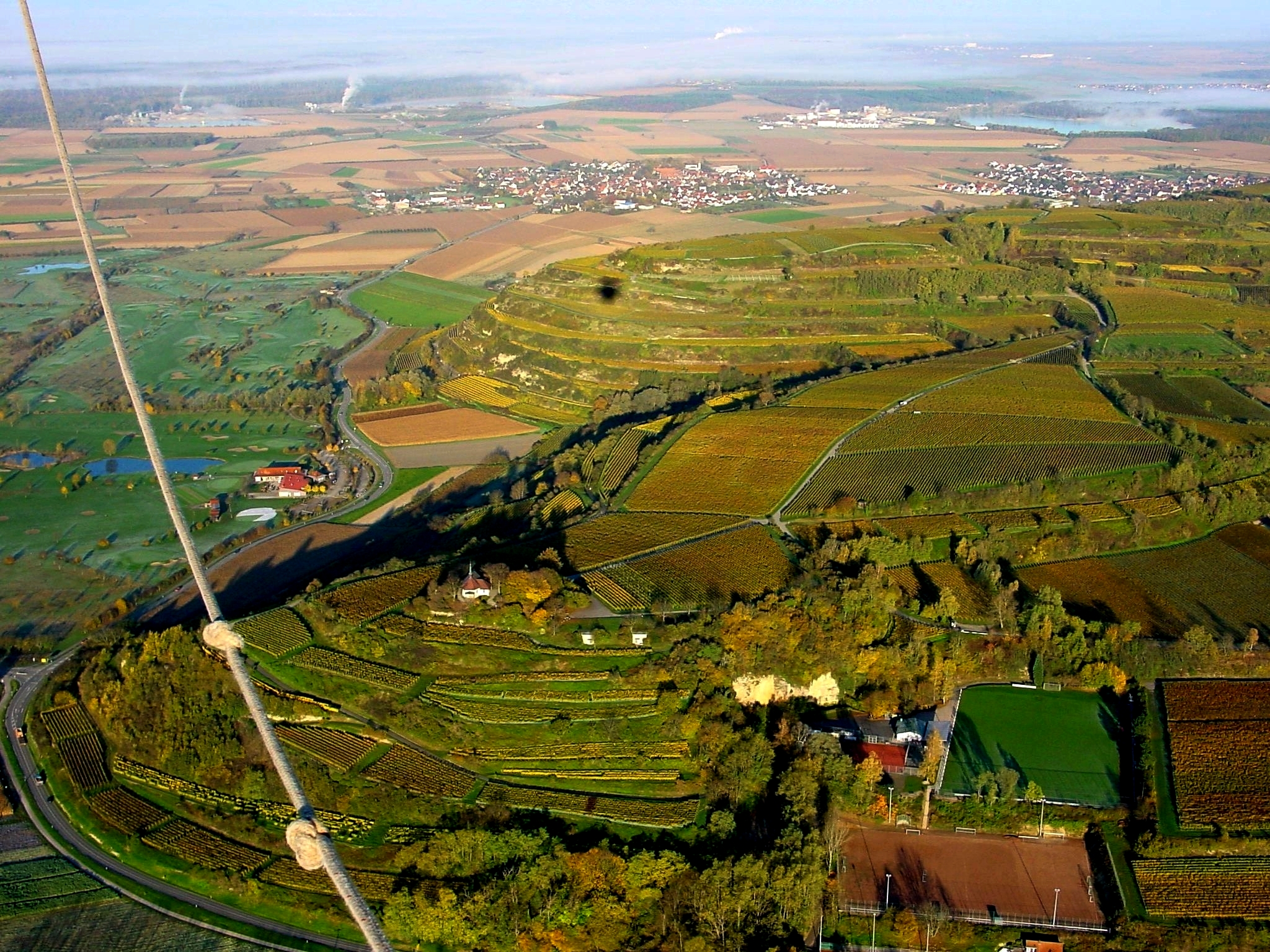 Luftbild vom südlichen Teil des Tunibergs, aufgenommen bei einer Ballonfahrt. Links im Bild das Wasserschutzgebiet "Tuniberggruppe Freiburg-Munzingen"